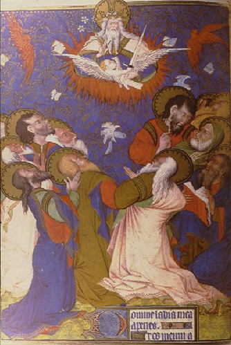 Pentecost